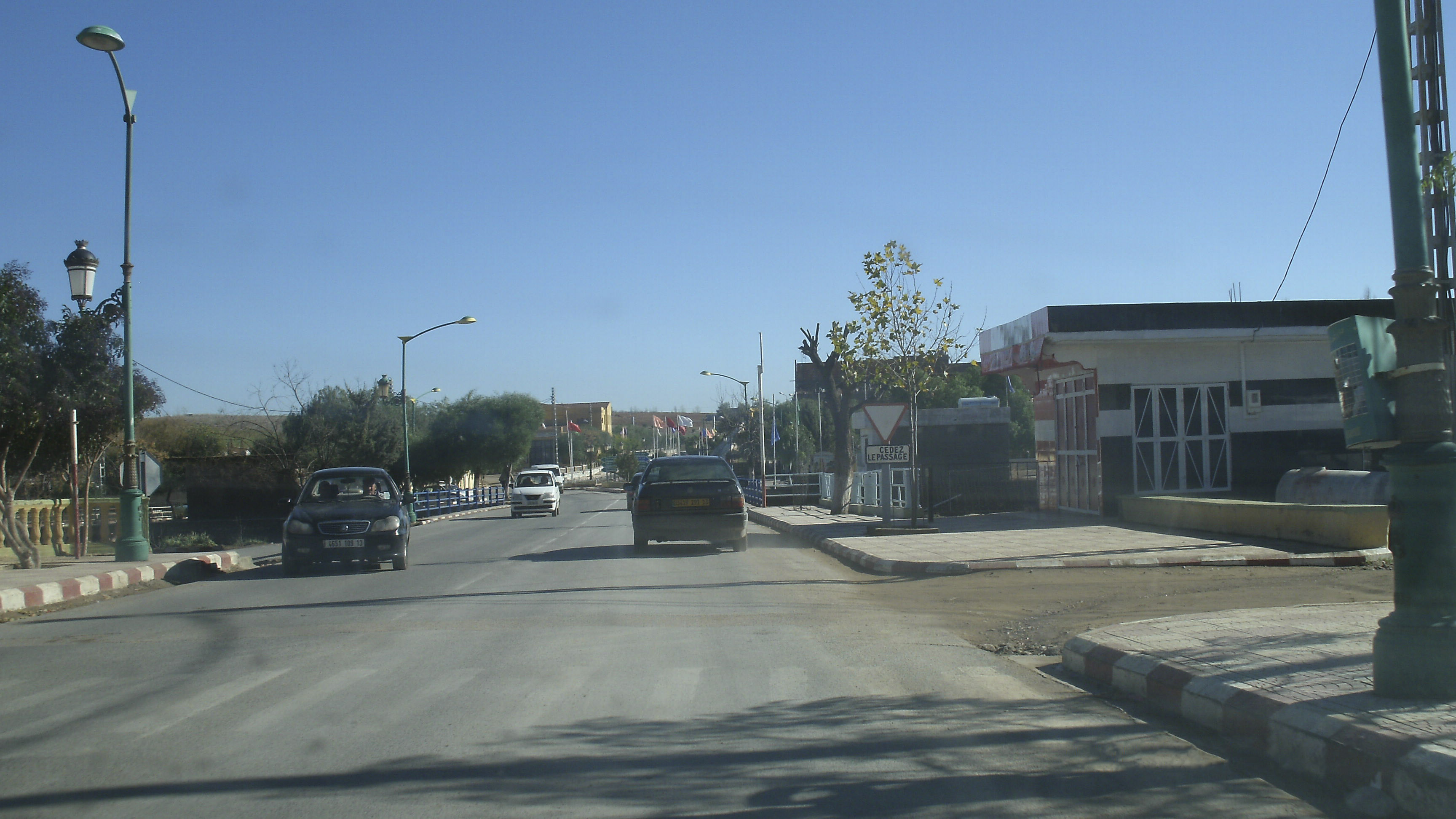 Aïn Tallout, la rue principale